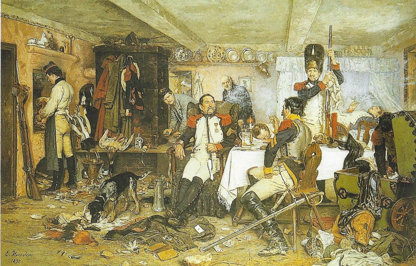 Gemälde „Aus der Franzosenzeit“ (vor 1813)